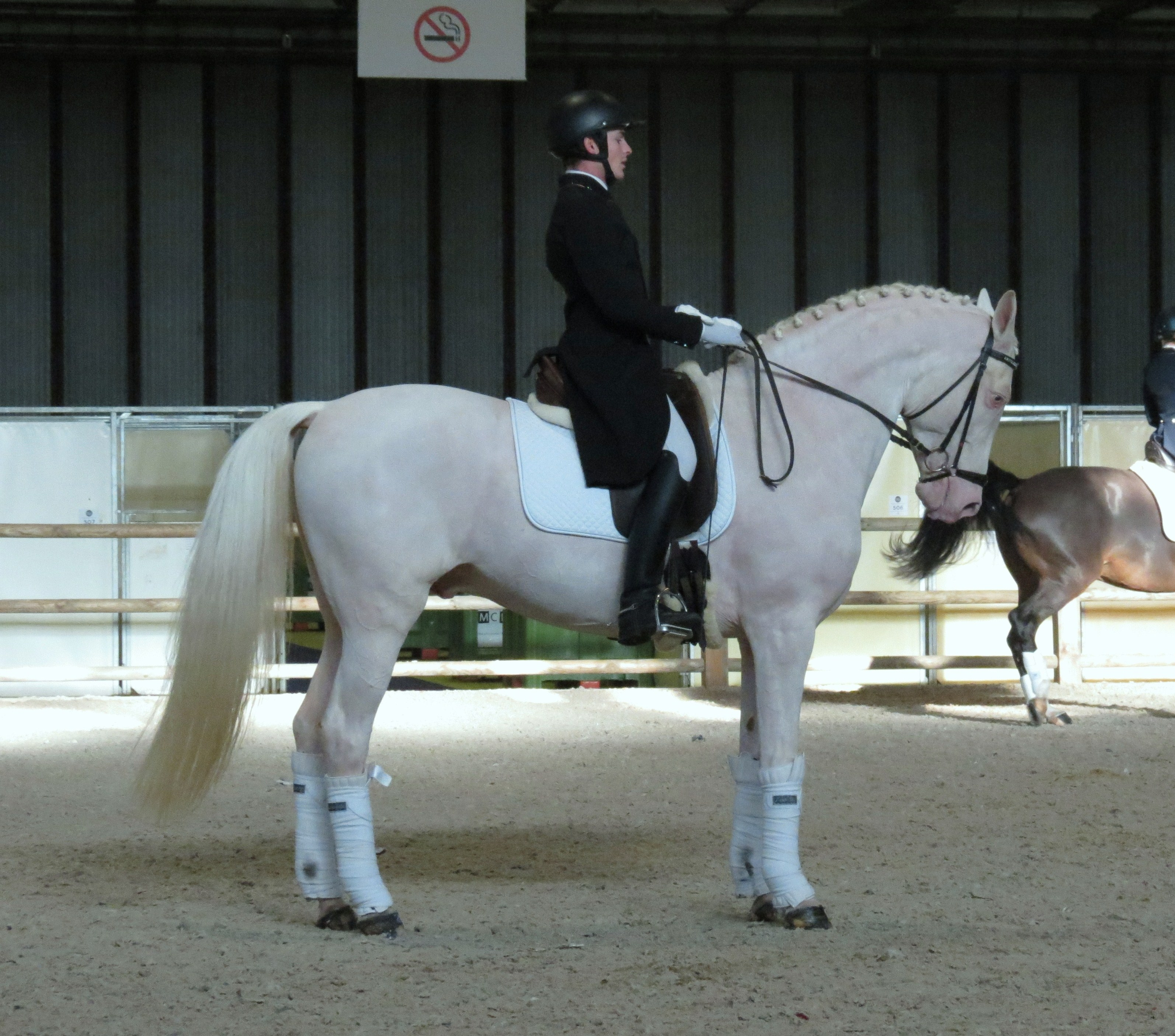 Etalon Lusitanien cremello